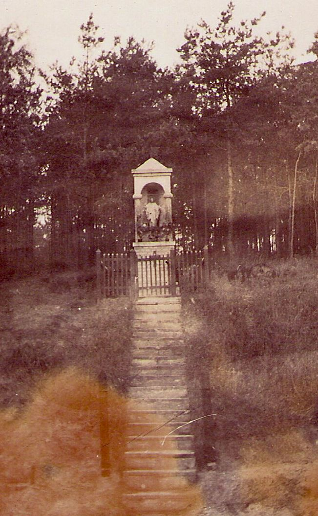 kopia podniszczonego zdjęcia rodzinnego nieistniejącej dziś kapliczki